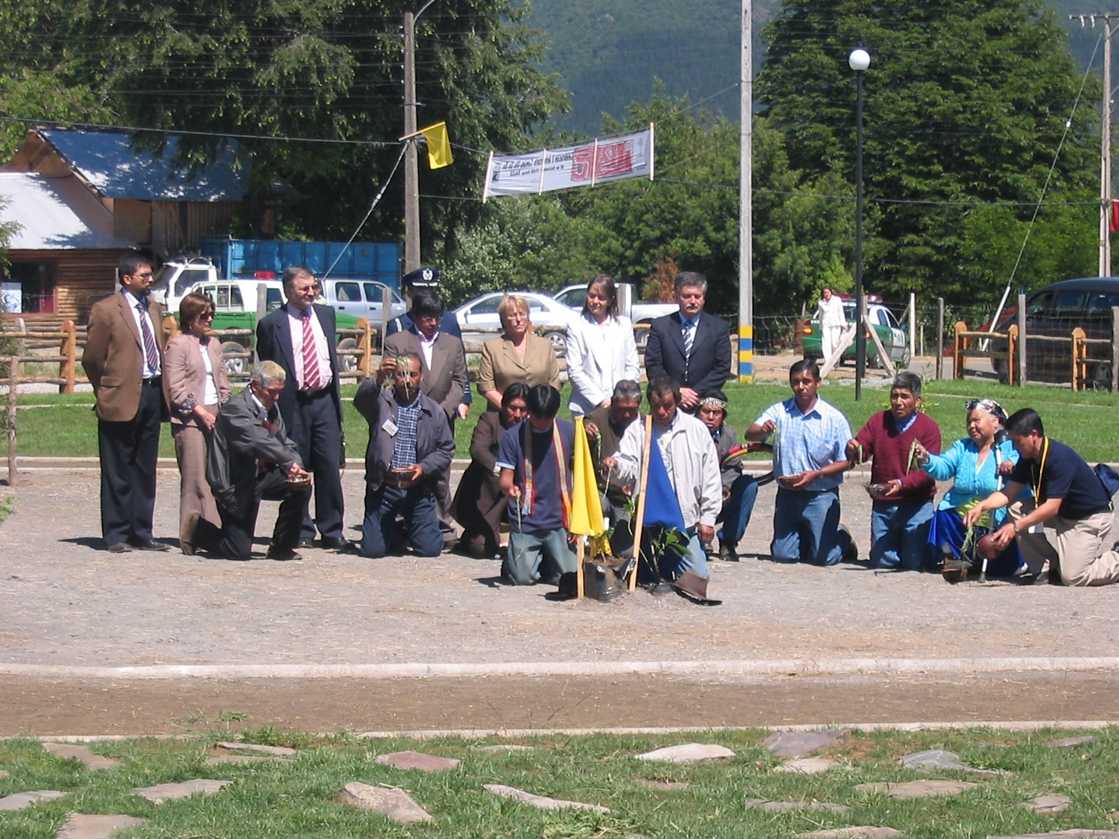 Rogativa mapuche con Ex Presidenta Michelle Bachelet